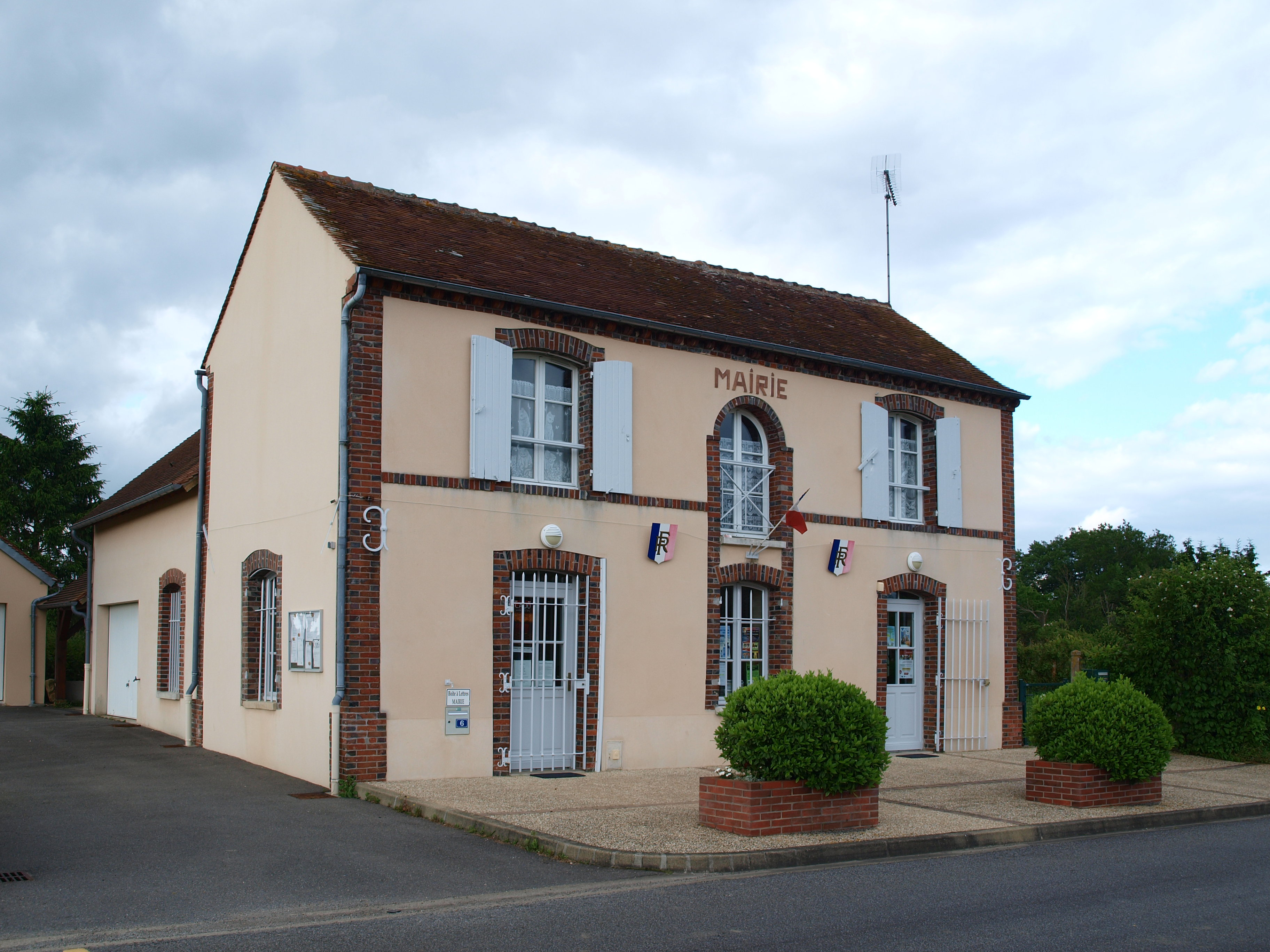 Foucherolles (Loiret, France); mairie.